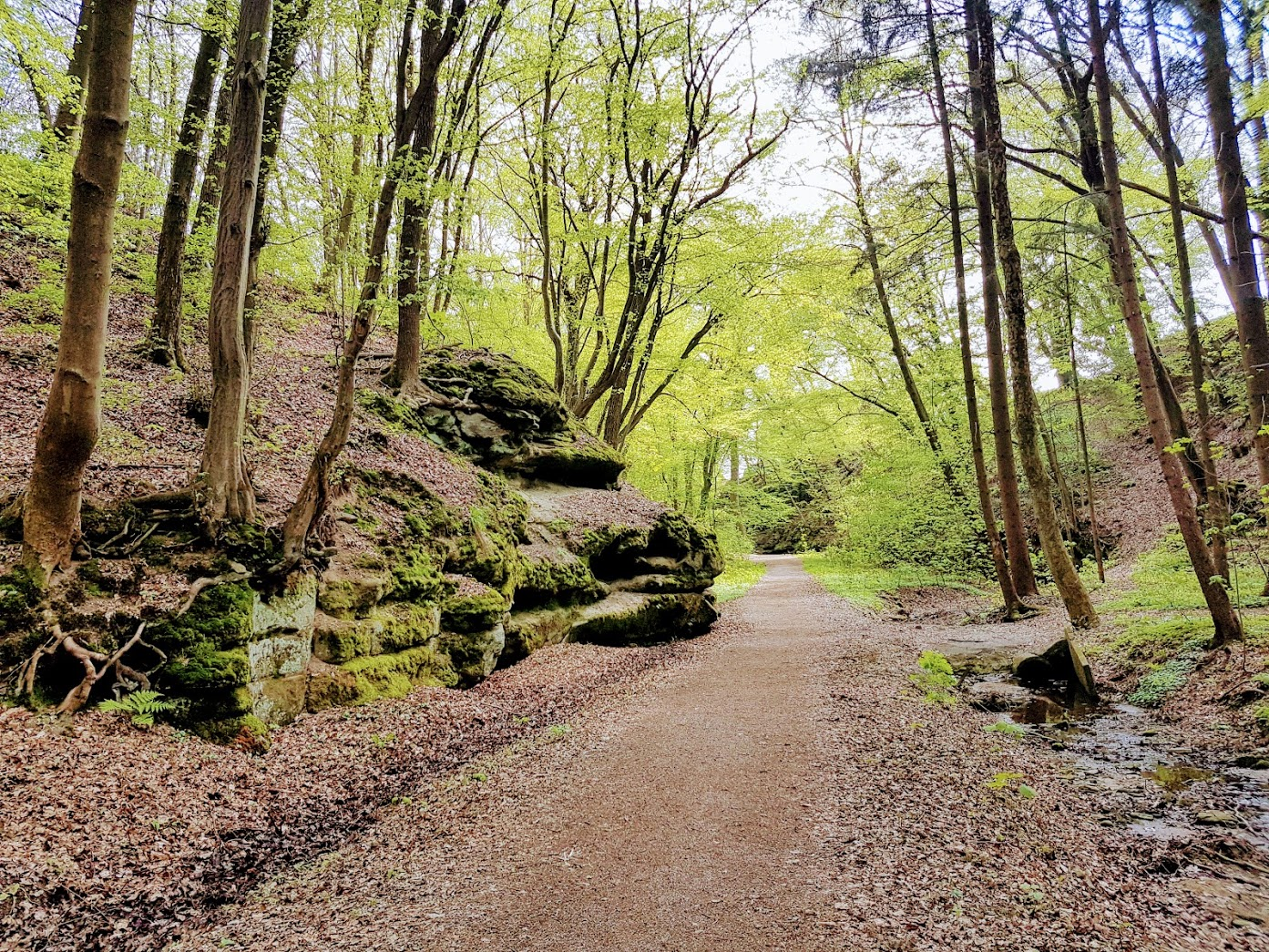 Rhätsandsteinschlucht Altenthann 2017